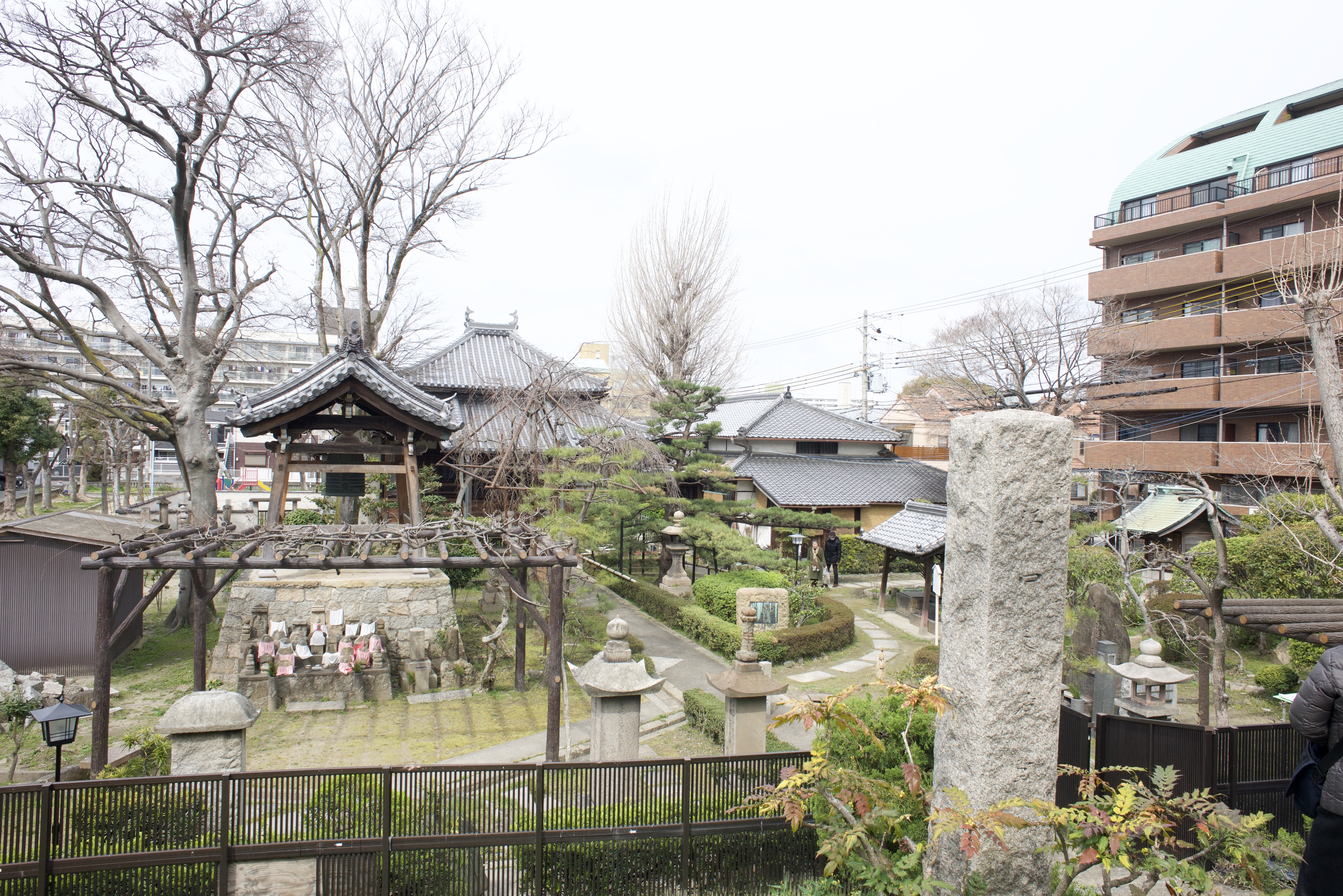 寂光寺の全景